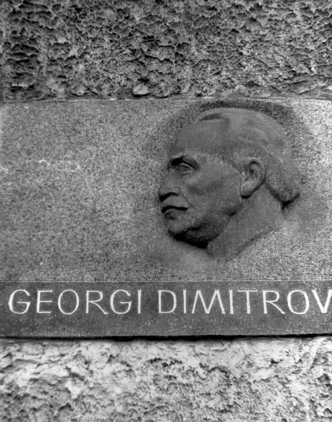 Vágóhíd utca 62., Bolgár Művelődési Ház (Bolgár Kultúrotthon) falán Georgi Dimitrov emléktáblája. Location: Hungary, Budapest IX. Tags: memorial plaque, Budapest Title: Vágóhíd utca 62., Bolgár Művelődési Ház (Bolgár Kultúrotthon) falán Georgi Dimitrov emléktáblája.